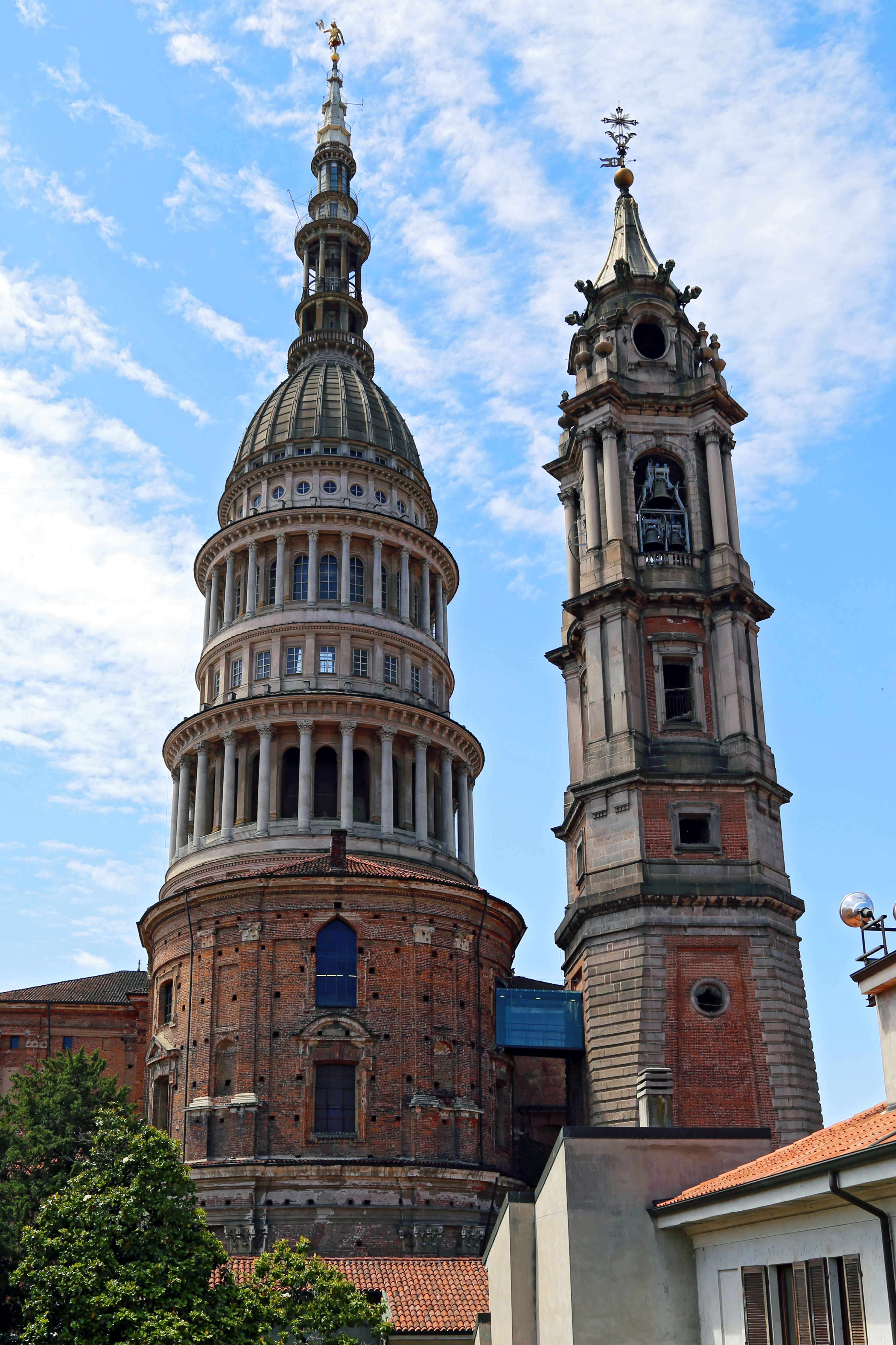 La cupola e il campanile della Basilica di San Gaudenzio visti dagli uffici comunali.